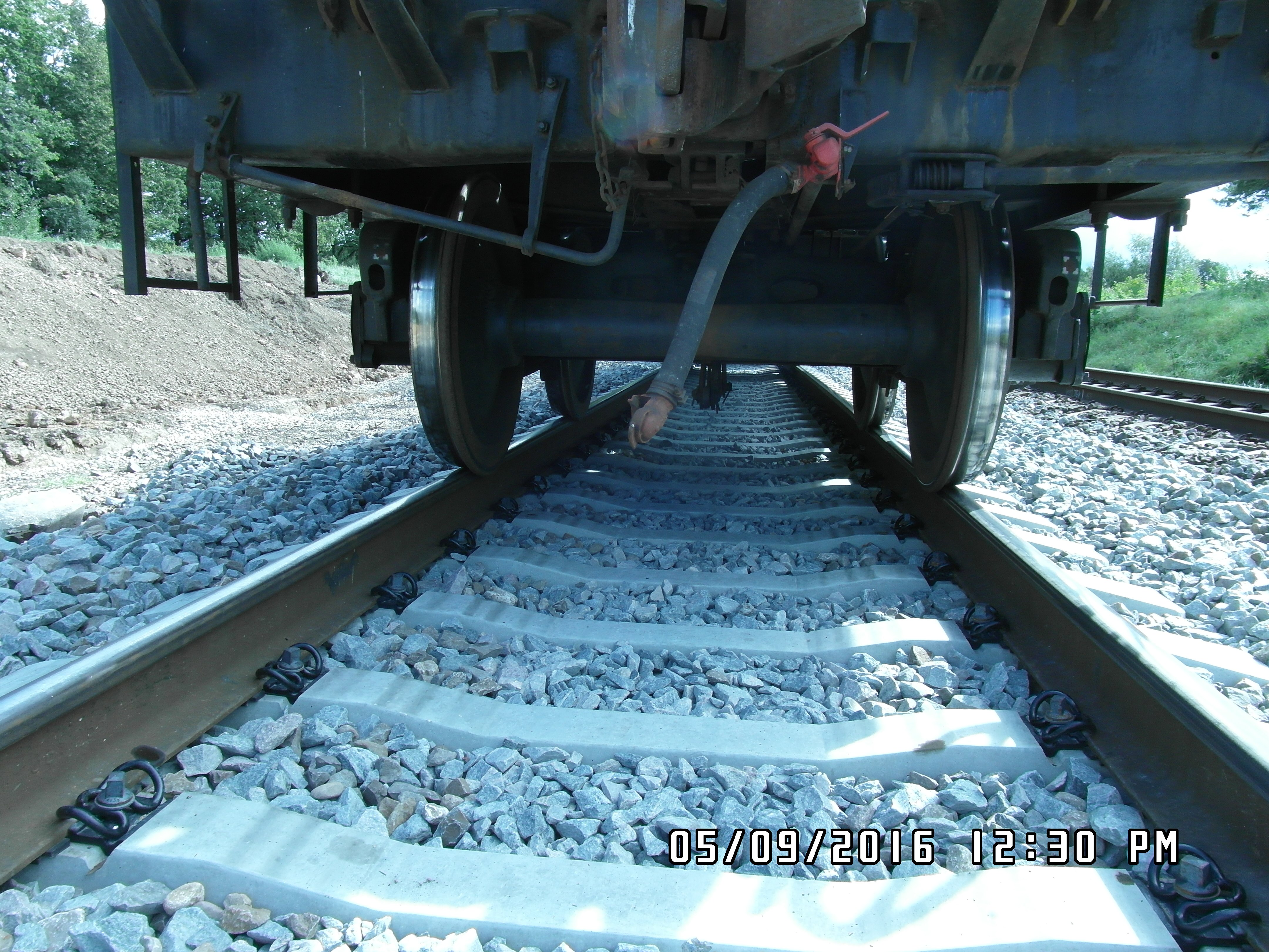 Vagona ratiņi uz sliežu platuma